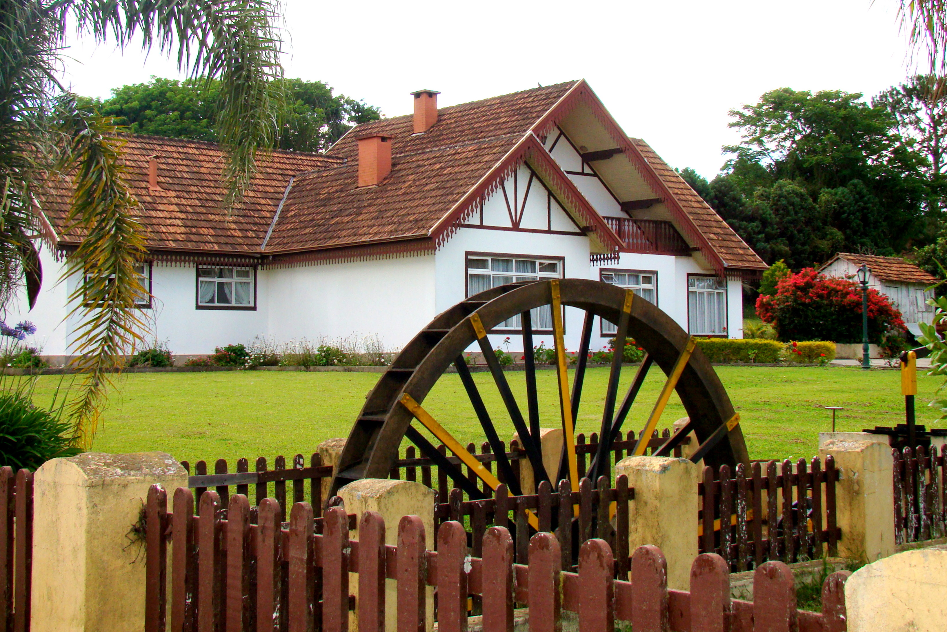 Casa na Colônia Witmarsum, Paraná, Sul do Brasil.